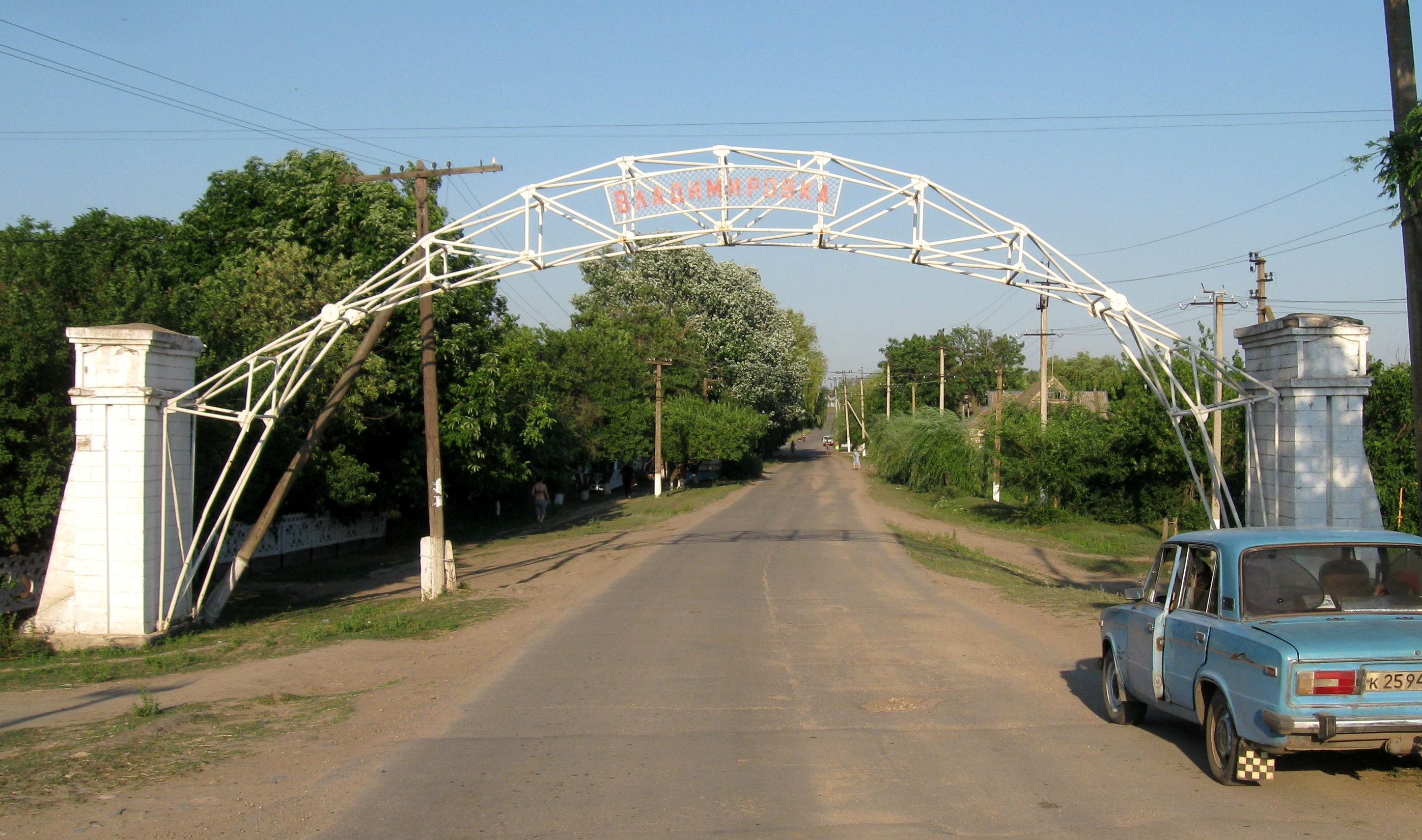 Арка на початку с.Володимирівка (Казанківського району)